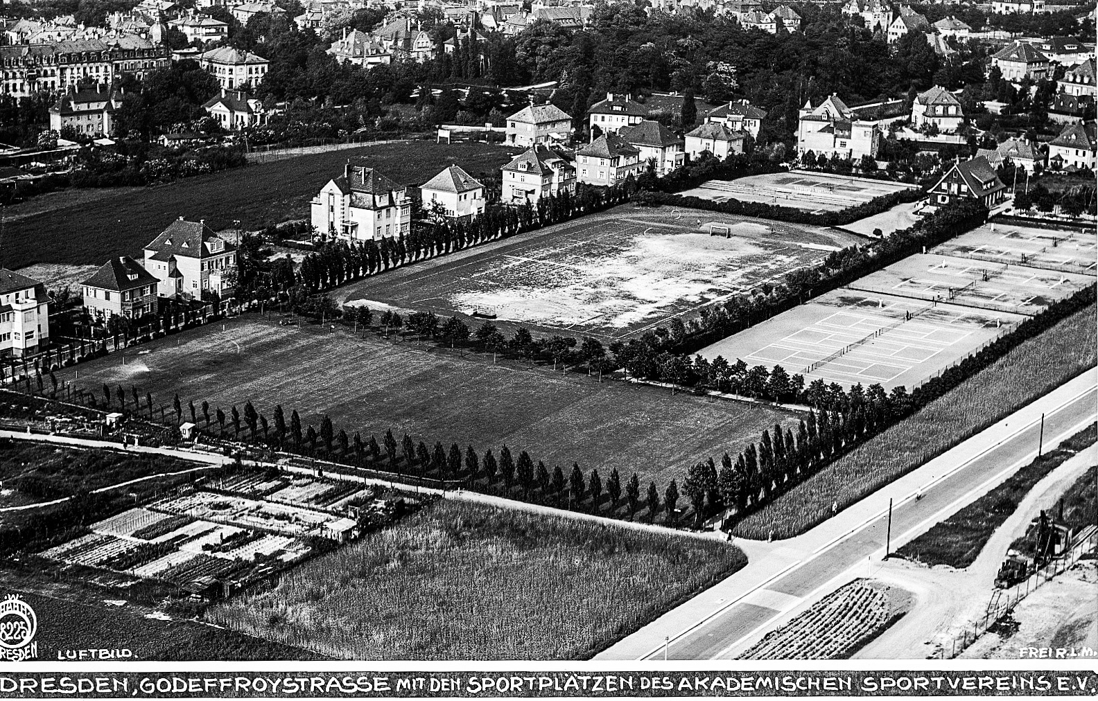 Original image description from the Deutsche FotothekDresden, Sportplätze am Zelleschen Weg und Godeffreystraße, Leonhard-Frank-Straße, 1932